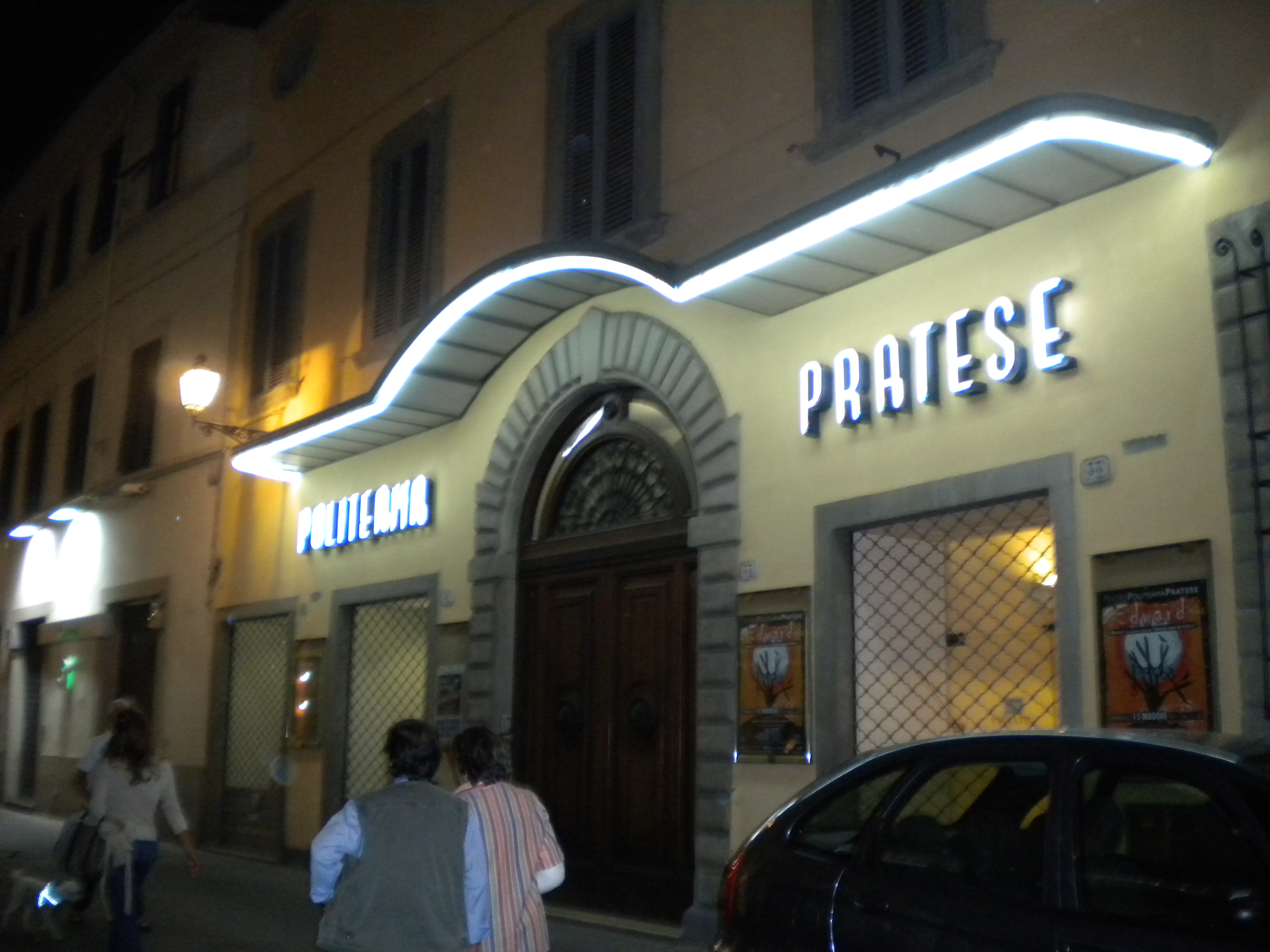 Politeama